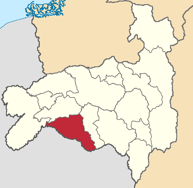 Mapa localizador del cantón en Loja, Ecuador